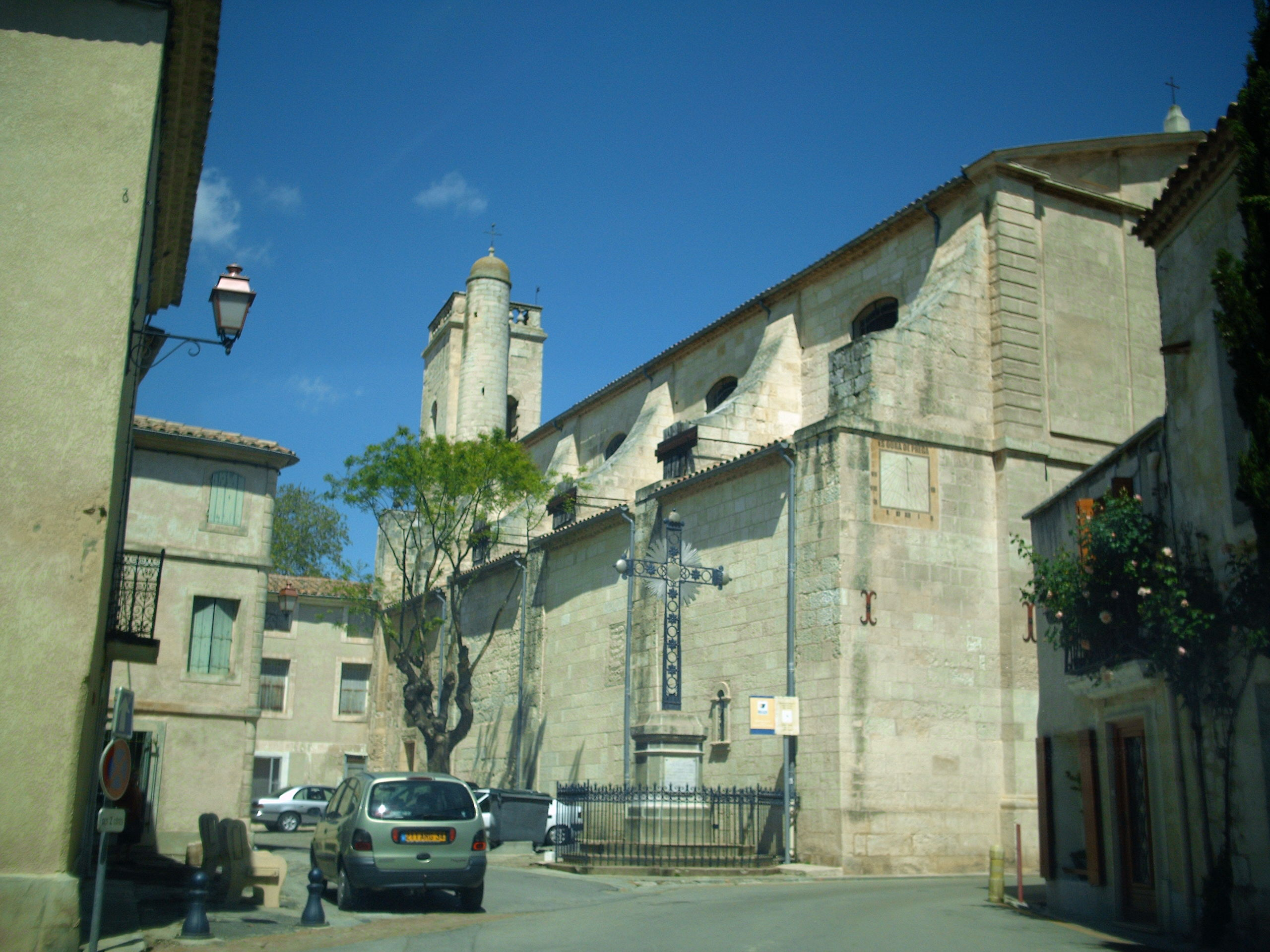 Église Saint-Martin de Lansargues (Hérault)